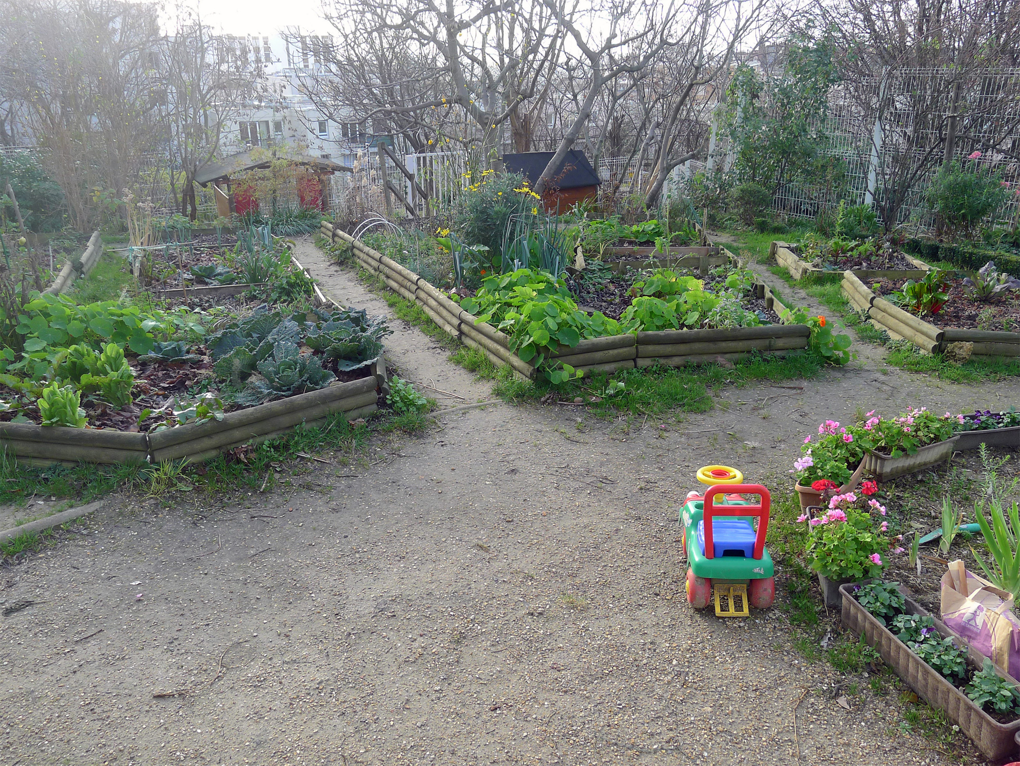 Jardin partagé de la butte Bergeyre - Paris XIX